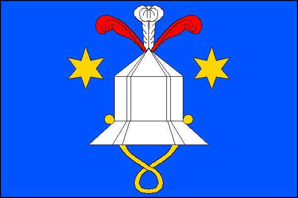 Vlajka obce Cetkovice